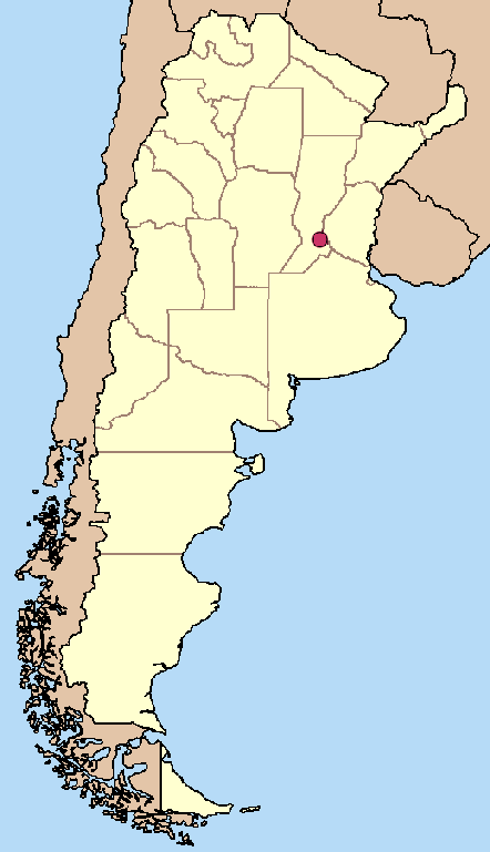 Own work on blank map of Argentina / Trabajo propio sobre mapa en blanco de Argentina. Rosario city situation / Localizaciòn de la ciudad de Rosario (Argentina) / This map violates legal regulations Argentina (Ley de la Carta (Law No. 22963)